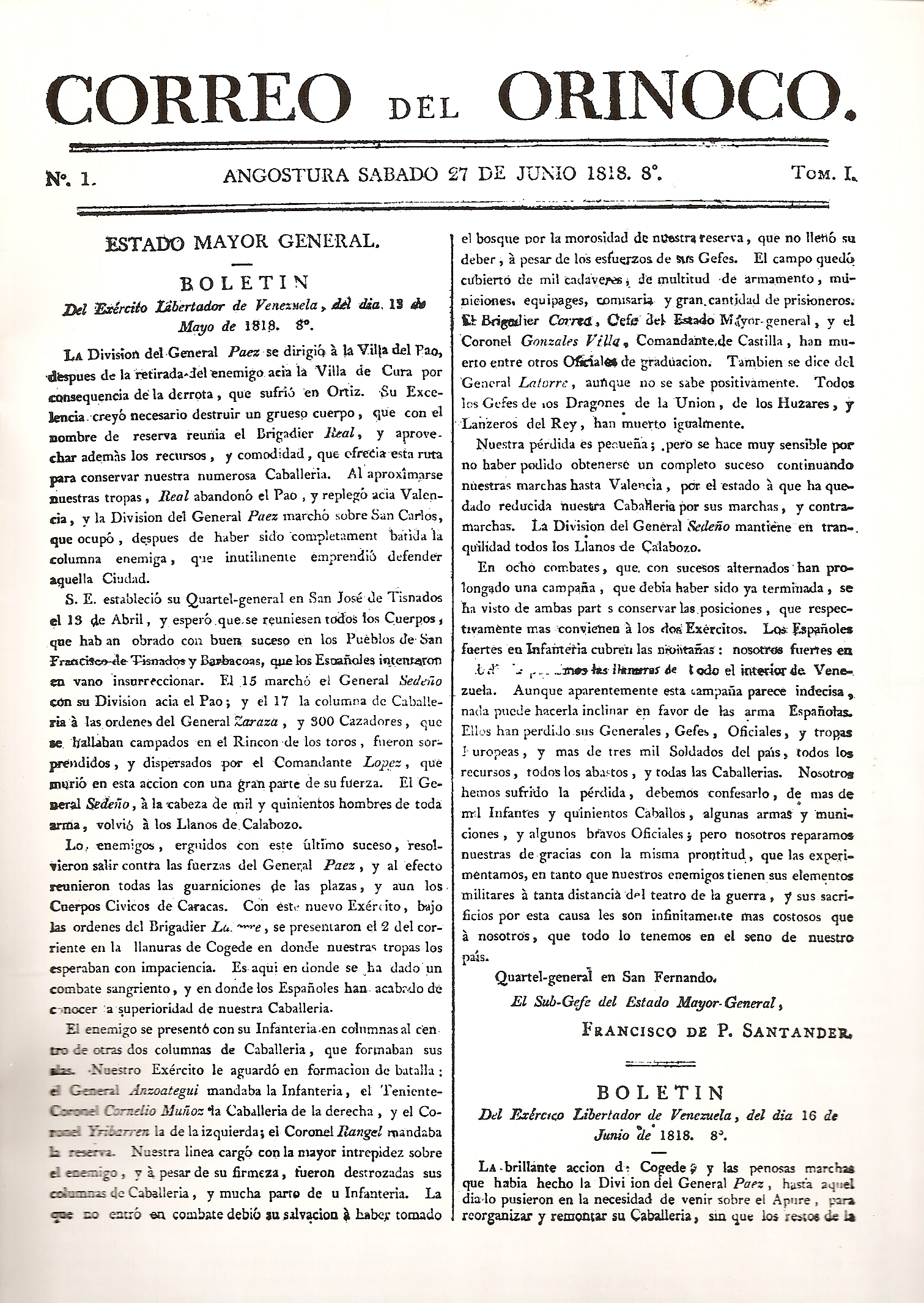 Prensa Venezolana del siglo XIX: Correo del Orinoco 1818